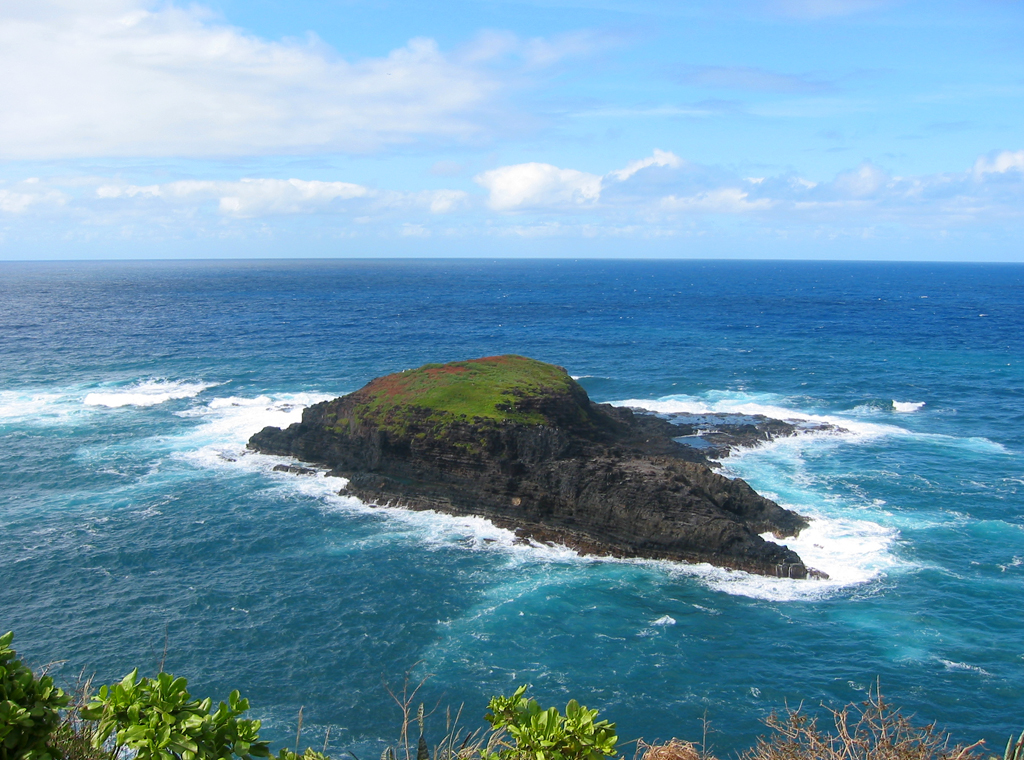 Mokuaeae Island, off Kilauea Point, Kauai, Hawaii.